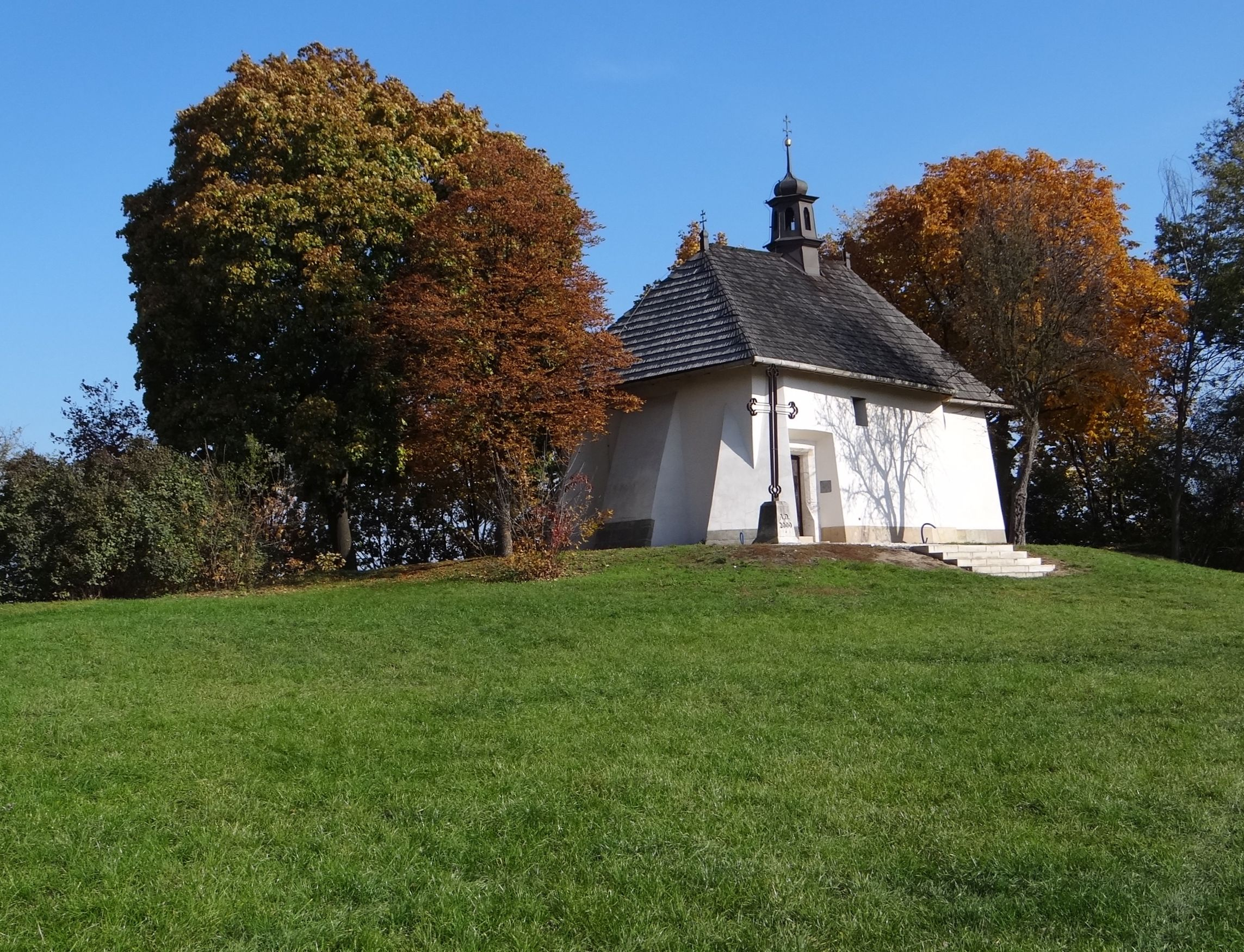 Kościół św. Benedykta na Wzgórzu Lasoty w Krakowie